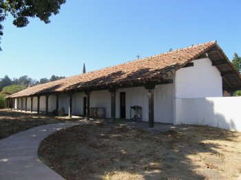 Santa Cruz USA 2004 Budynek misji. Zdjęcie własne